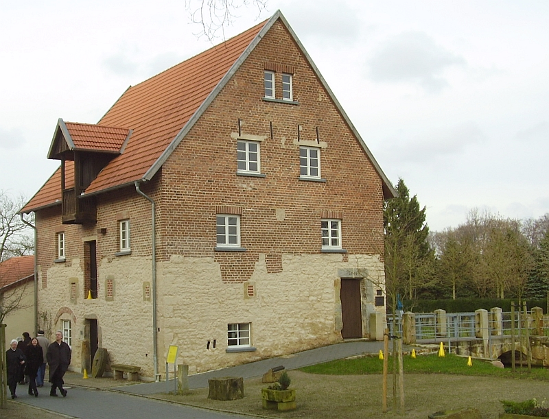 Mühle des Klosters Gravenhorst